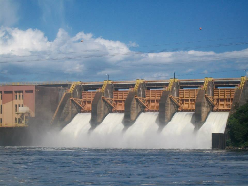 Foto de uma barragem em Barra Bonita